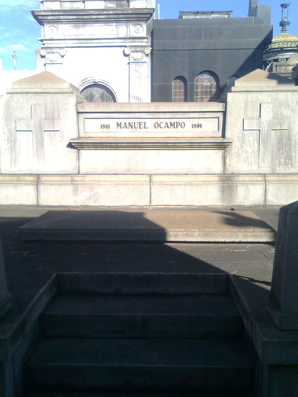 Sepulcro de la familia Ocampo, donde reposan los restos de las escritoras Silvina y Victoria Ocampo, Cementerio de la Recoleta, Buenos Aires, Argentina.